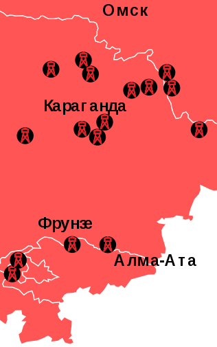 Карлаг (у города Караганда) и соседние лагеря ГУЛАГ НКВД СССР